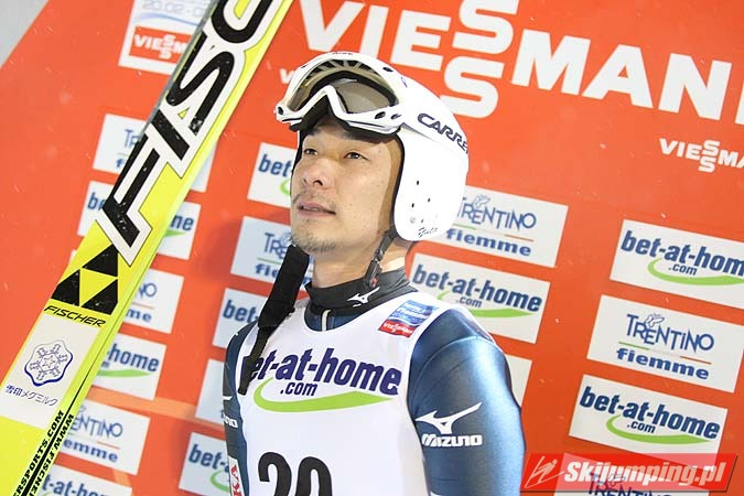 Yuta Watase podczas serii kwalifikacyjnej do konkursu Mistrzostw Świata 2013 na skoczni normalnej